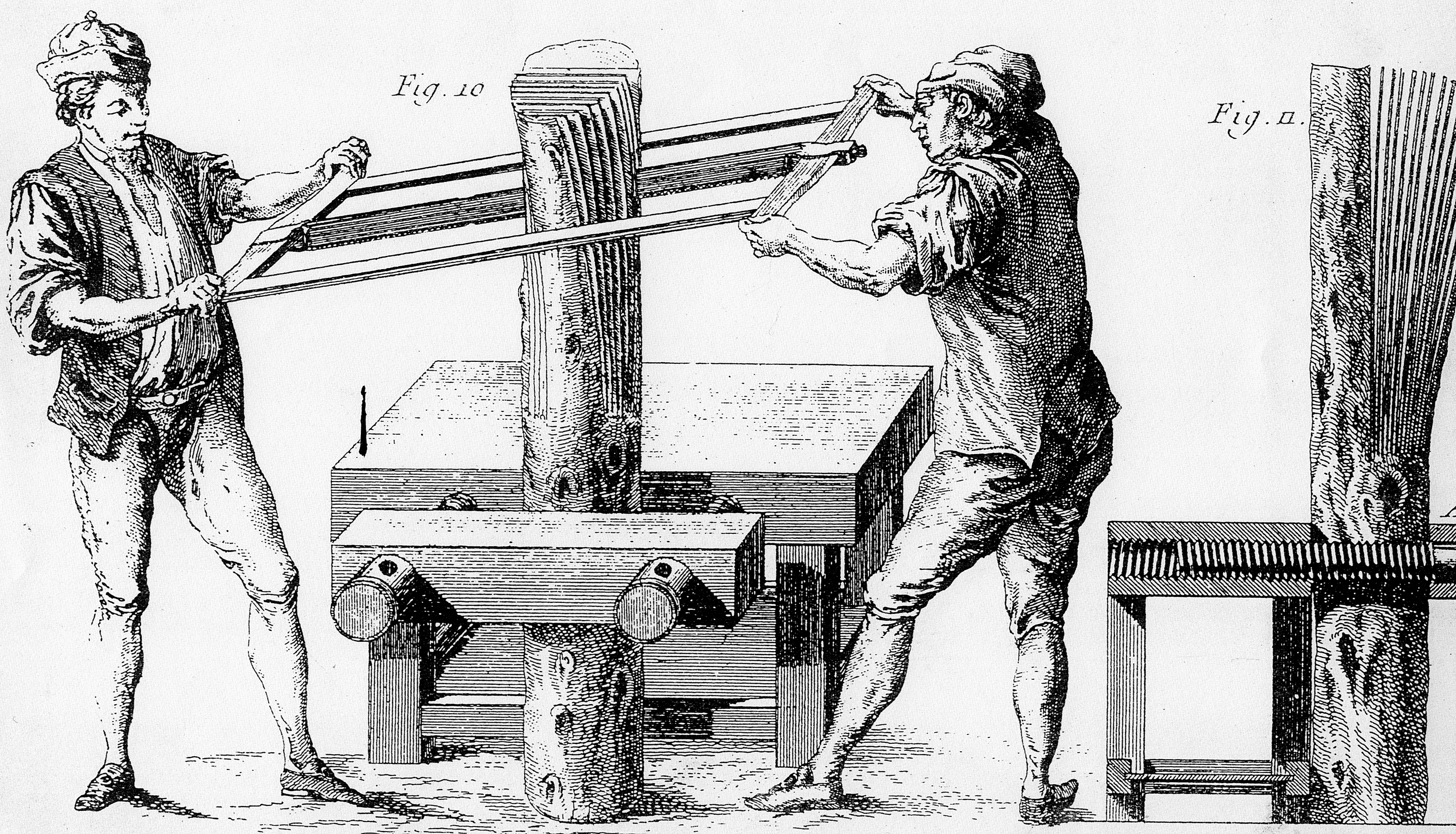 Le sciage du placage par Roubo. Menuisier et auteur d'une encyclopédie fin XVIIIe siècle.